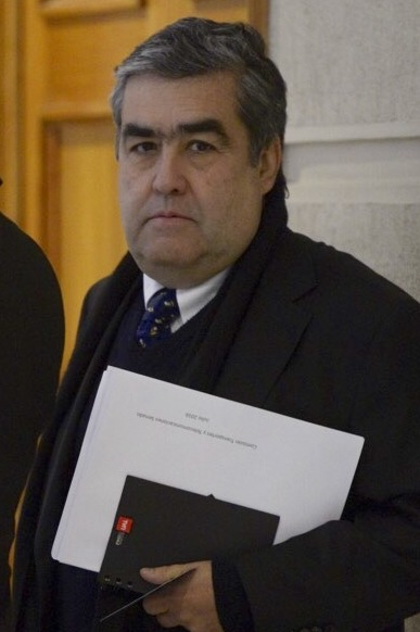 Ministro Marcelo Díaz asiste a Comisión de Transporte y Telecomunicaciones en el marco del debate sobre las indicaciones al Proyecto de Ley que moderniza TVN